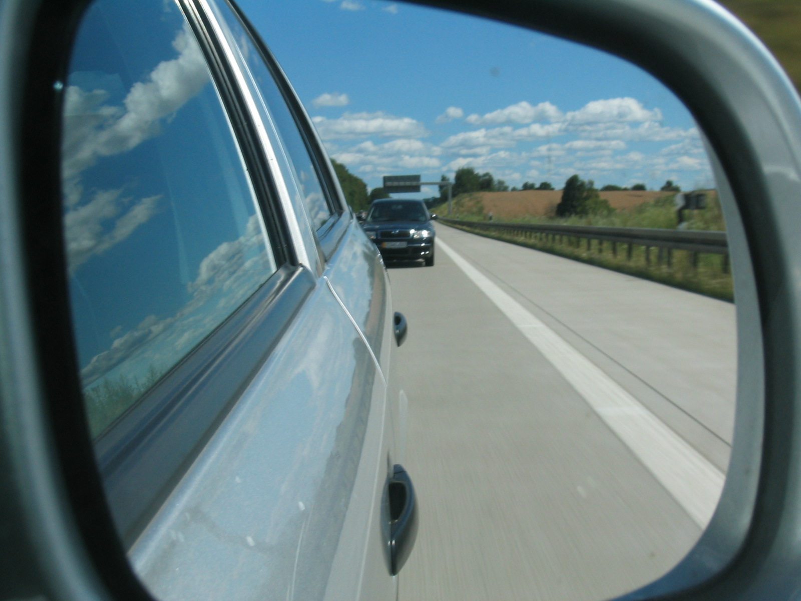 Blick in den rechten Außenspiegel eines Skoda Octavia. Im Blick ein Skoda Superb.